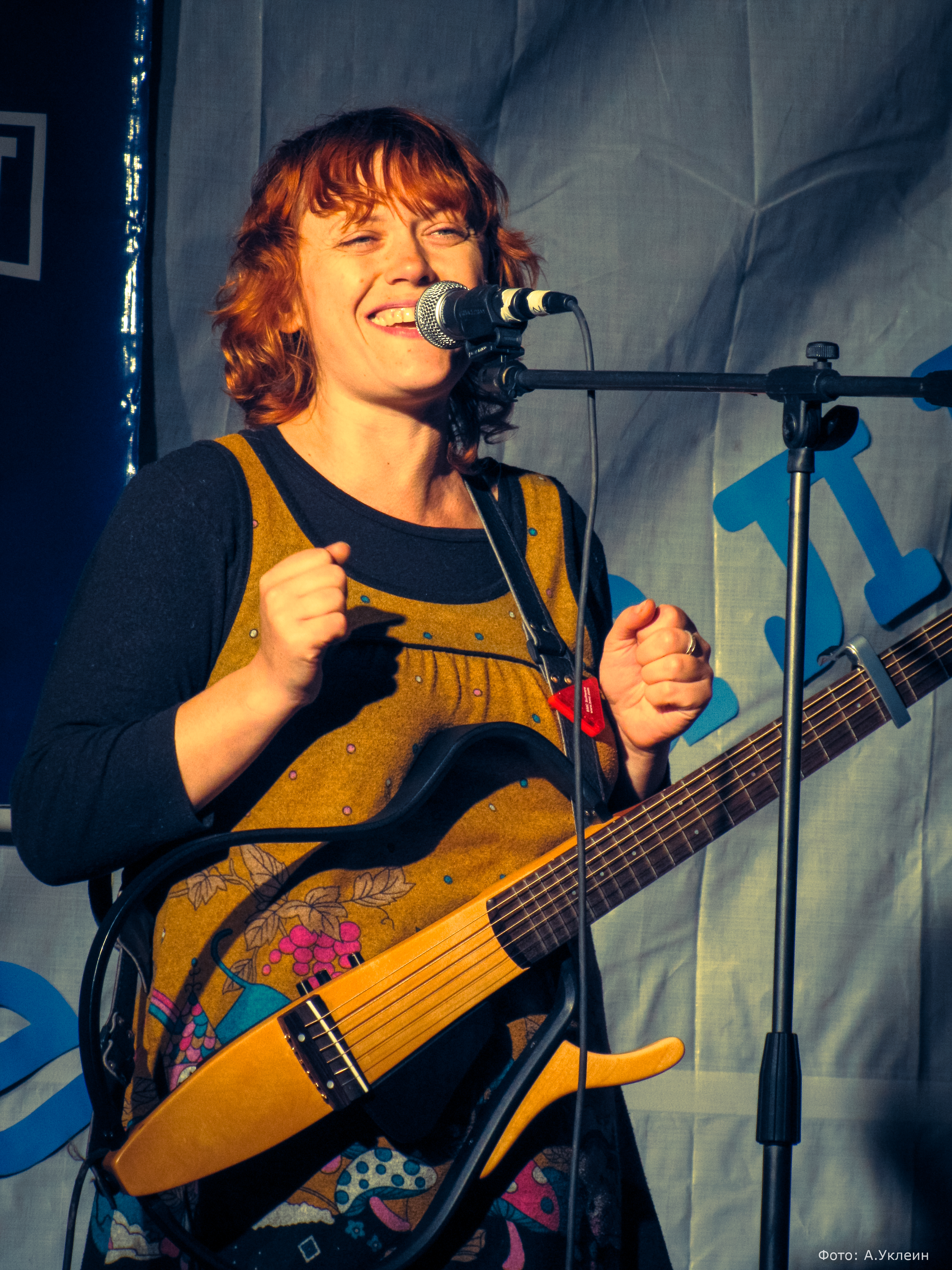 Ольга Чикина на слёте KSPUS, 10 октября 2009